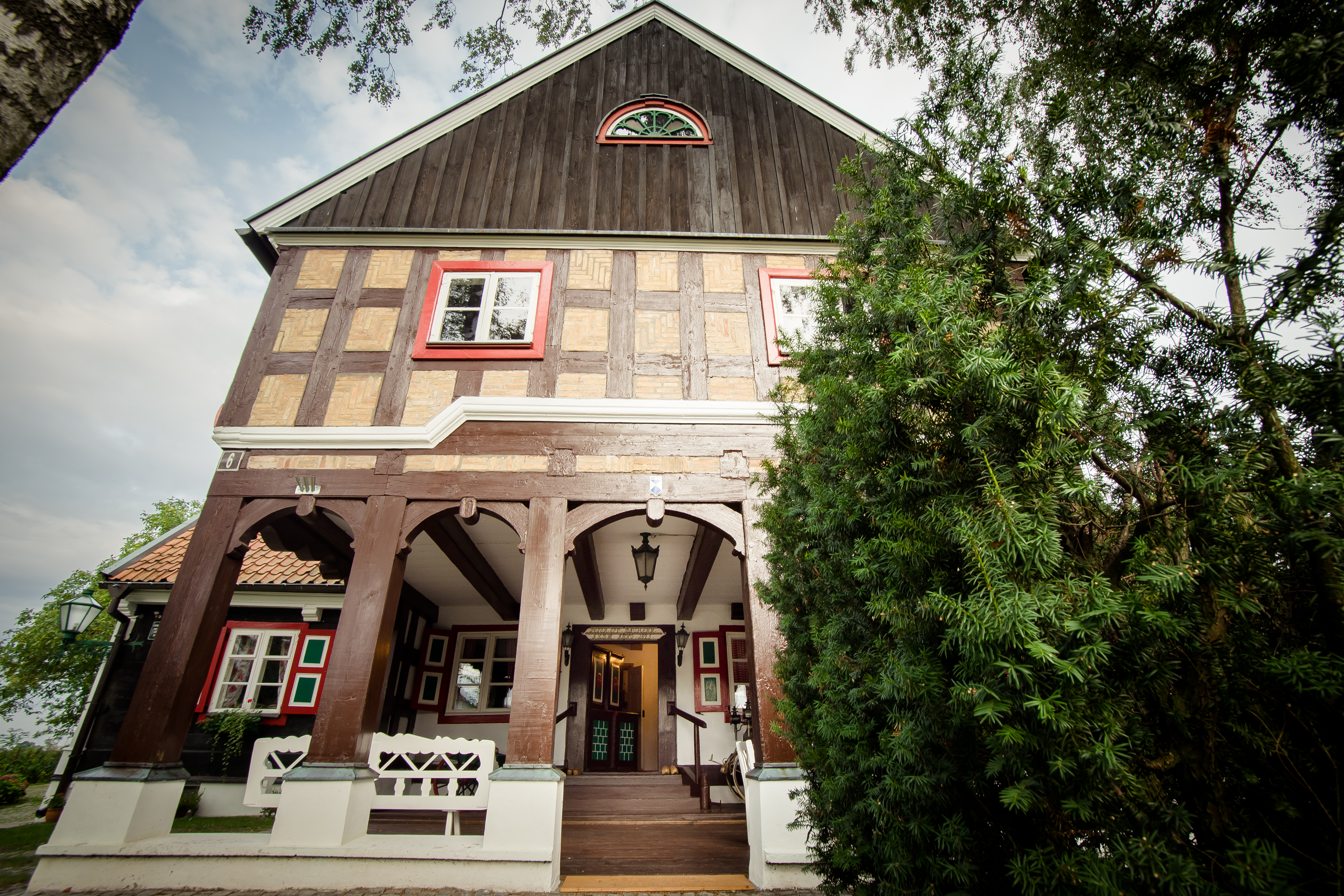 Podcień domu nr 6 w Żuławkach